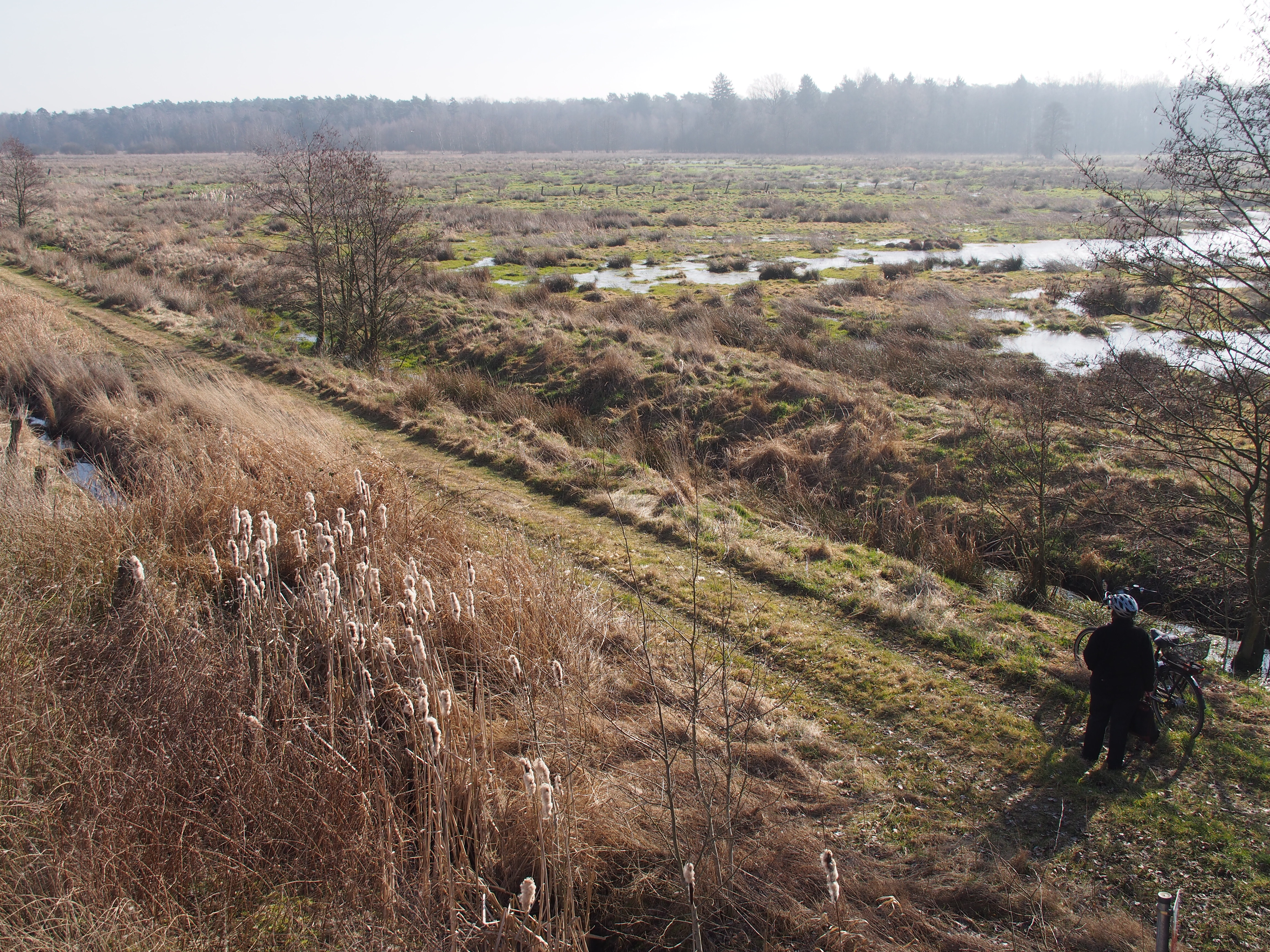 Postmoor (NSG Lutter) bei Bargfeld, Gemeinde Eldingen, Landkreis Celle - rechts des Weges der Bach "Köttelbeck"